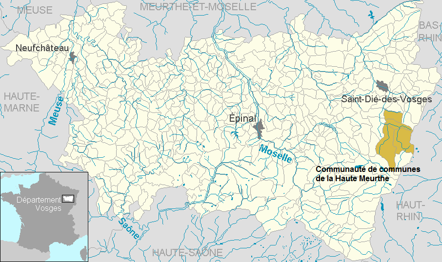 Communauté de communes de la Haute Meurthe dans le département des Vosges, Lorraine, France